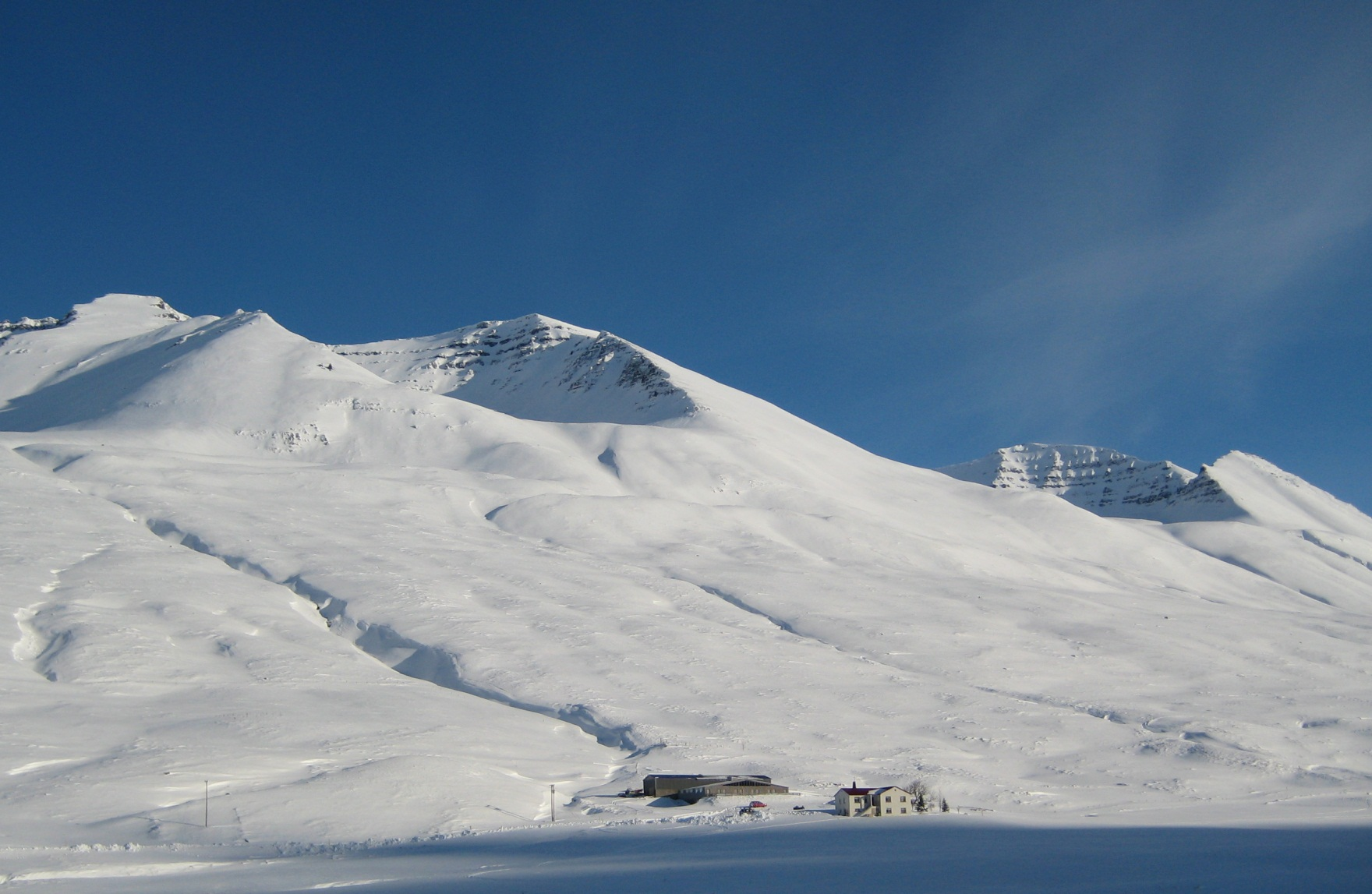 Klængshóll í Skíðadal